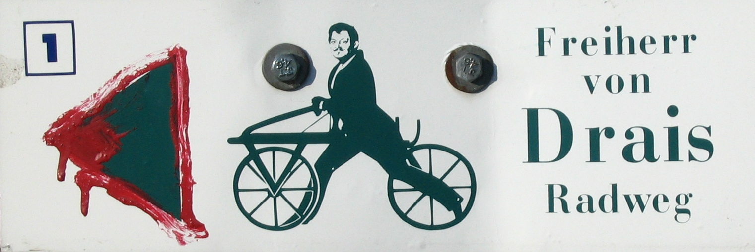 Logo des Freiherr von Drais Radweg bei Kirchberg im Hunsrück